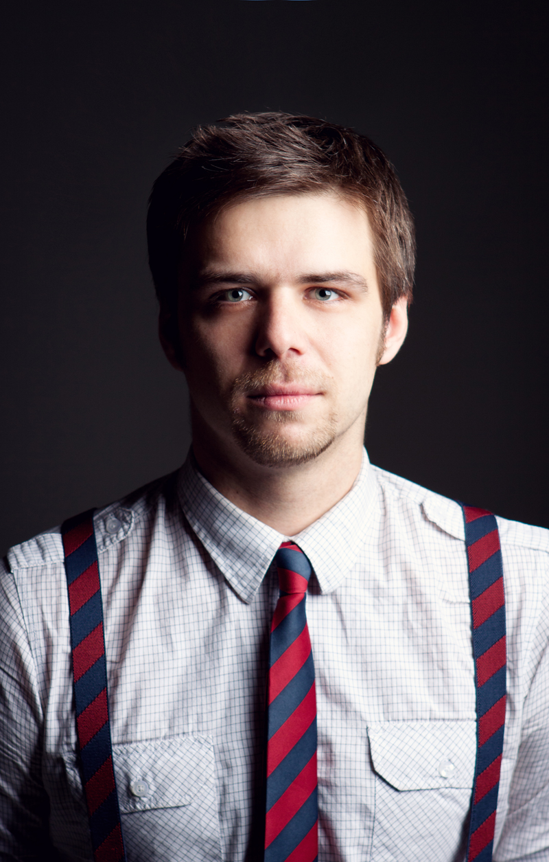 Fotograaf - Sandra Palm.